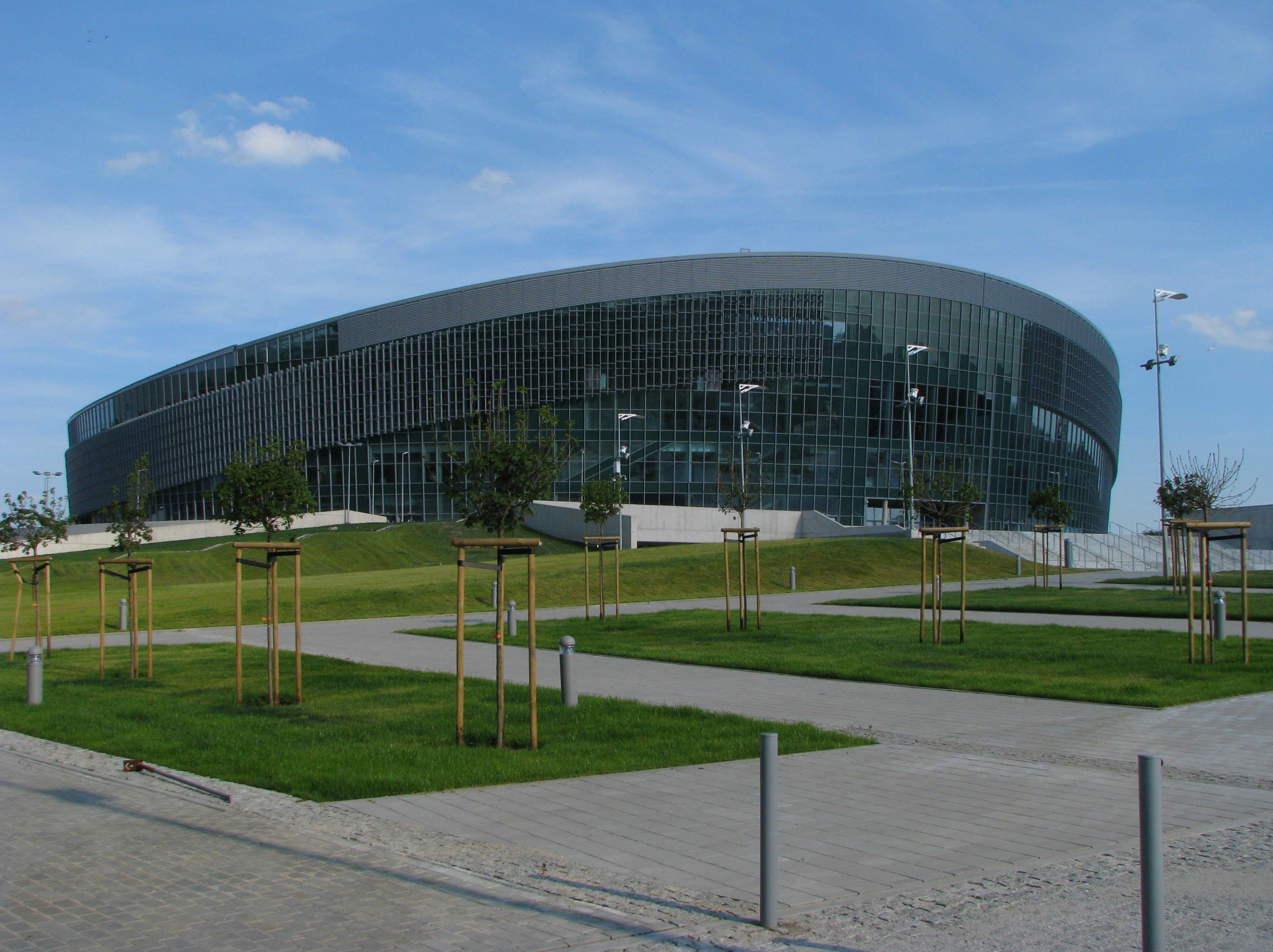 Hala Gliwice, ul. Kujawska, Gliwice